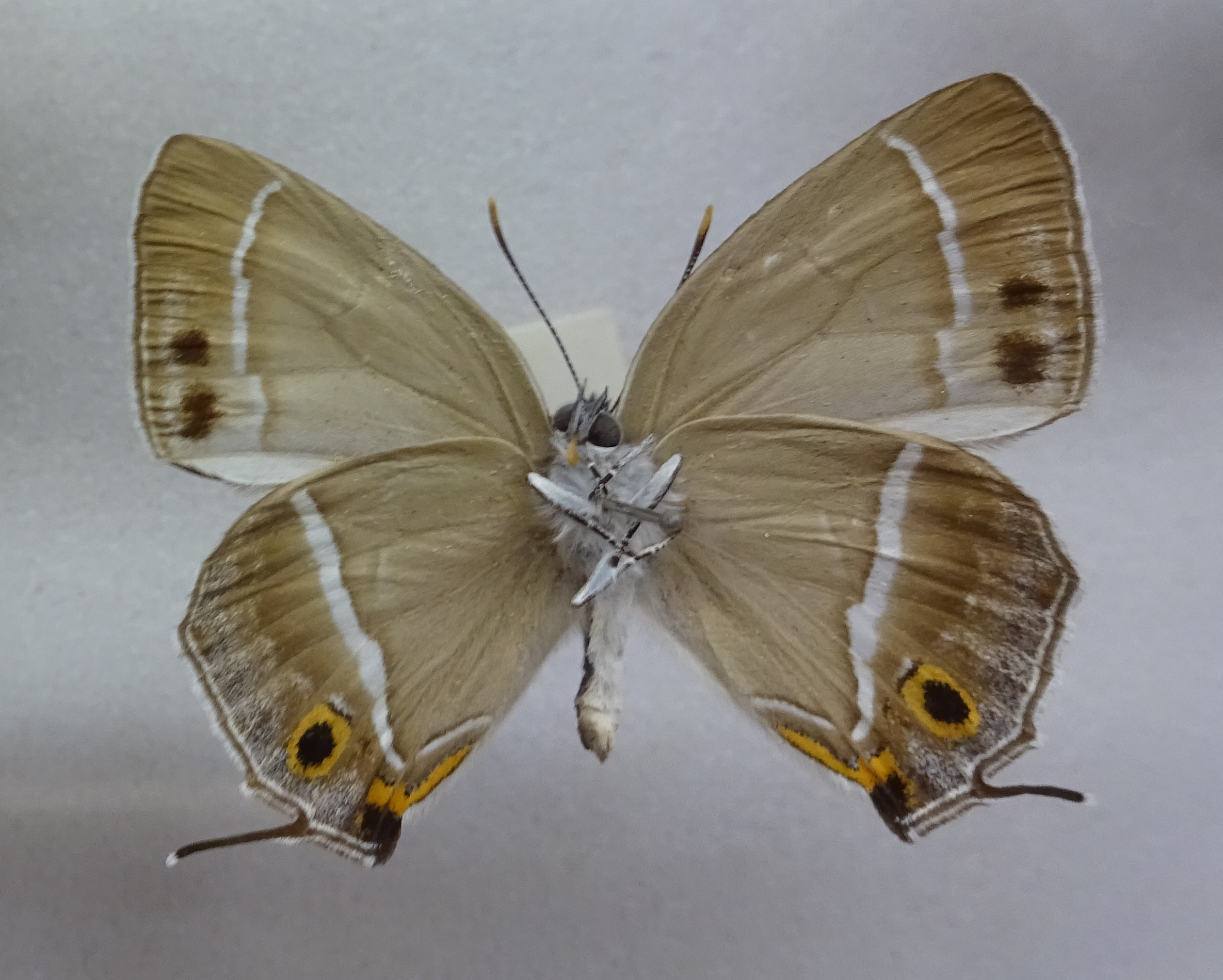 ヒサマツミドリシジミ